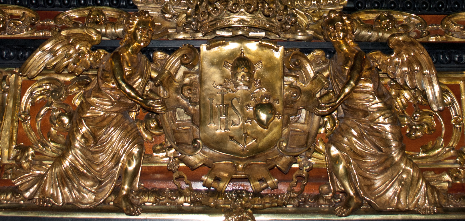 Detalle del paso de la Quinta Angustia, Semana Santa de Sevilla.